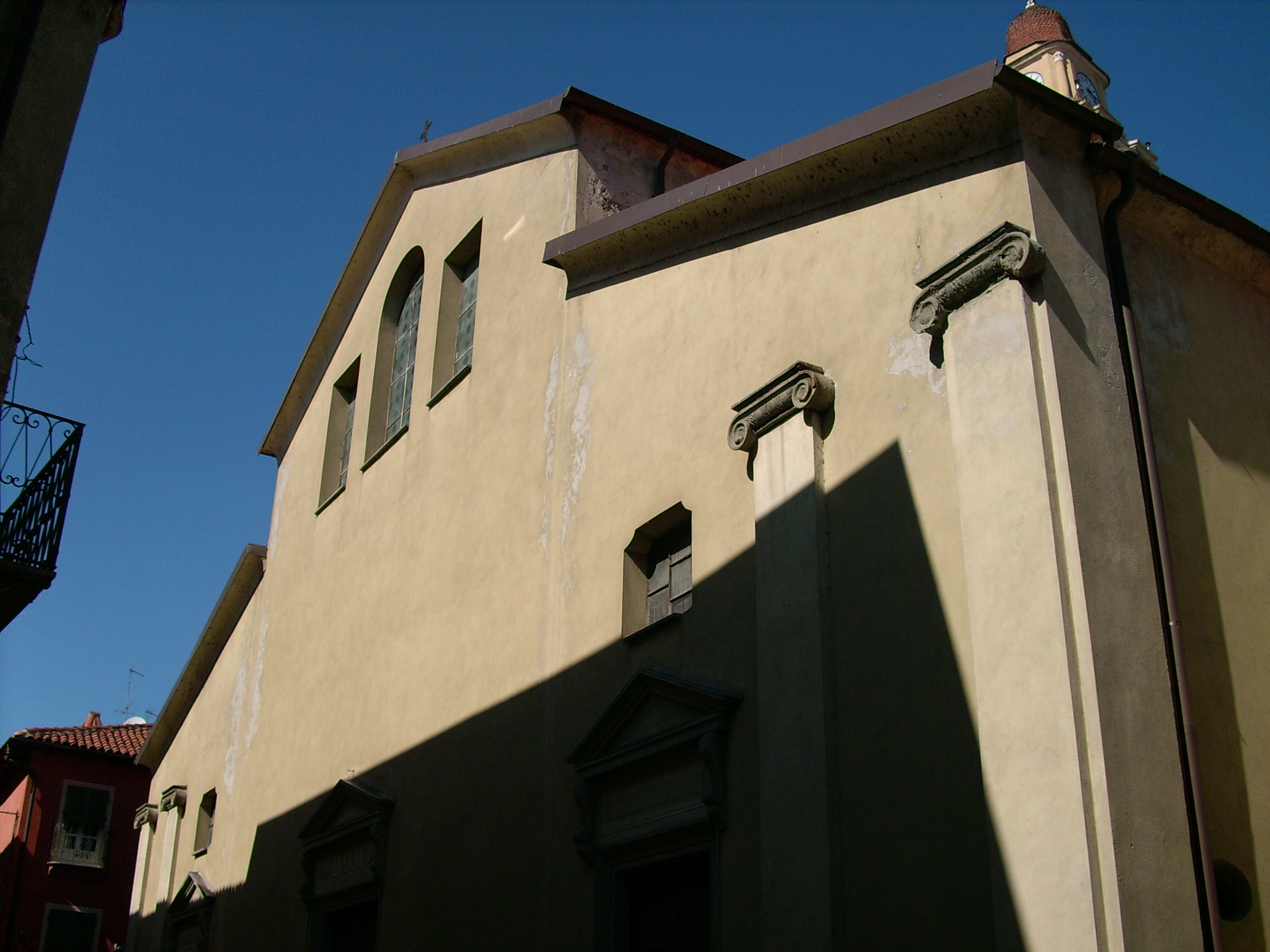 Chiesa di san Lorenzo di Cairo Montenotte, Liguria, Italia